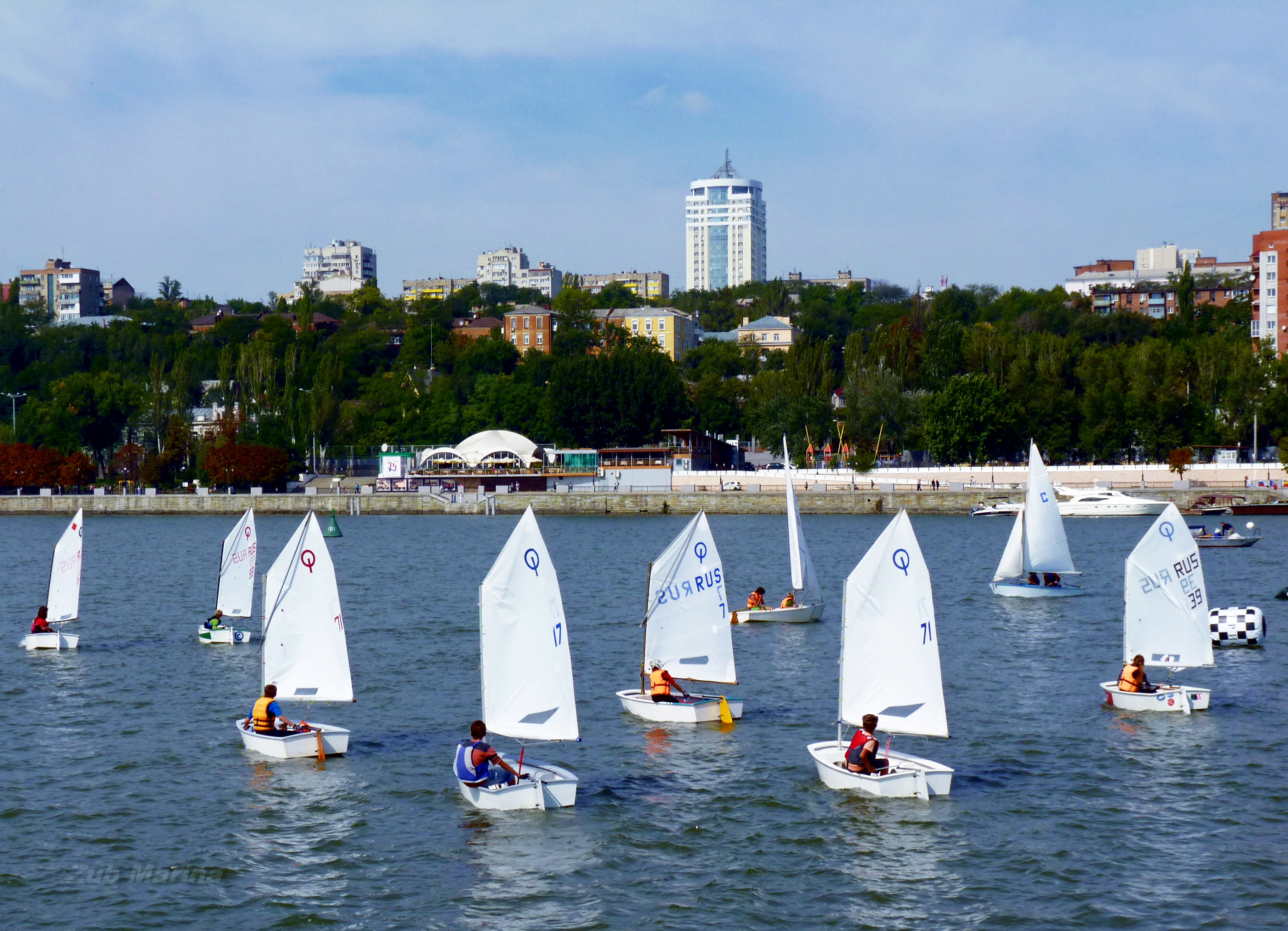 Река Дон, Набережная Ростова-на-Дону